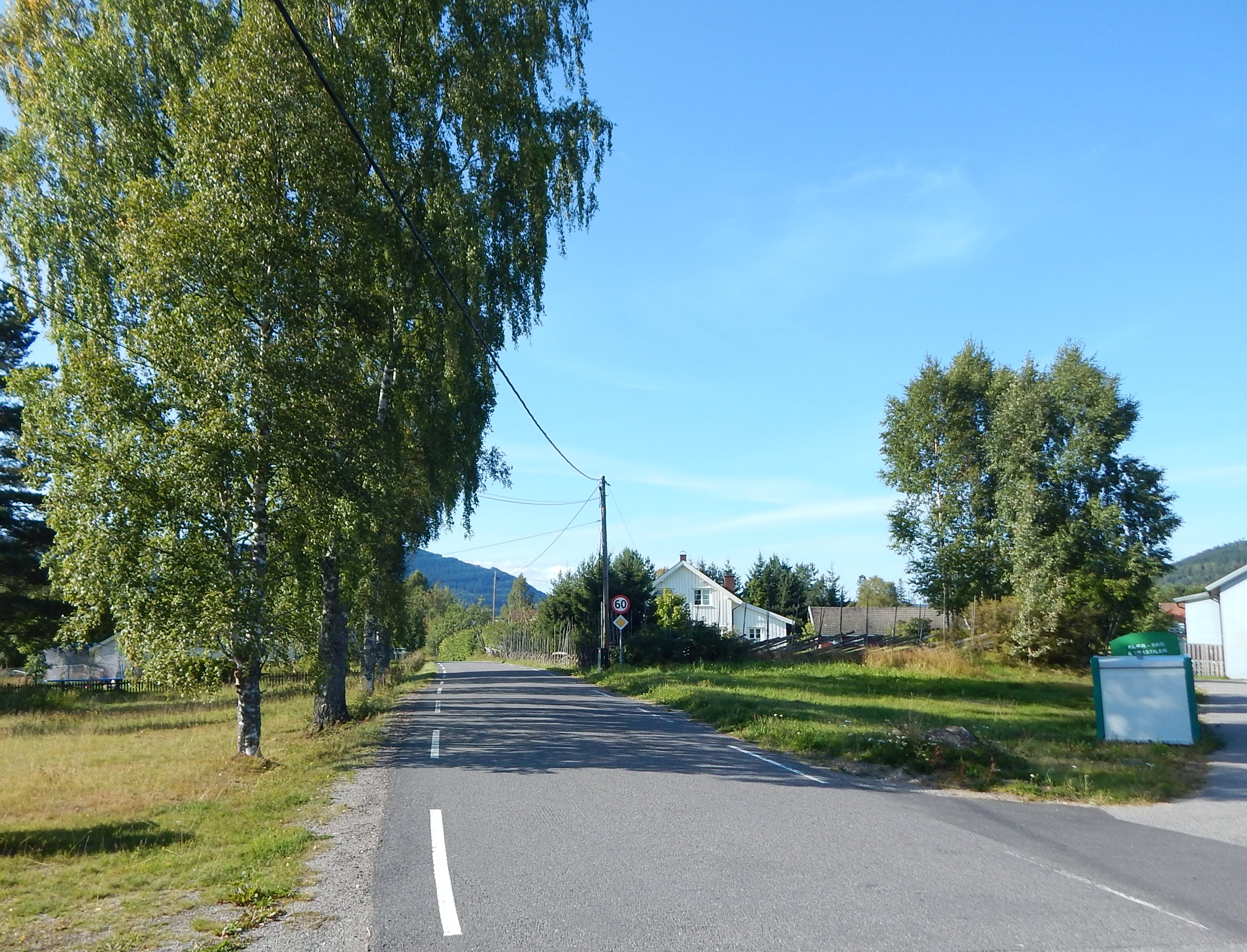 Knaimoen (fylkesvei 552) nær enden ved primær fylkesvei 180